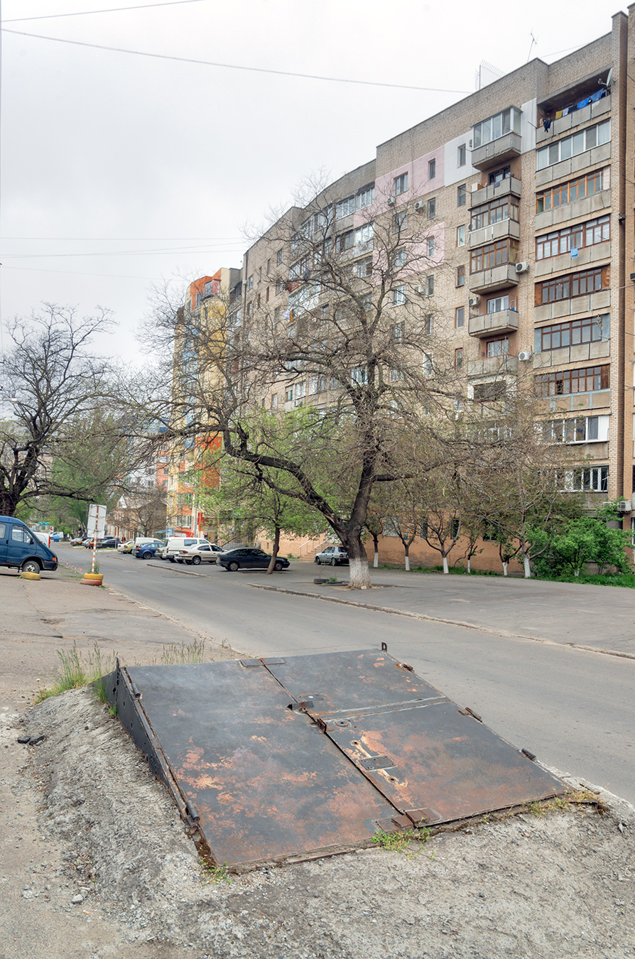 Одеські катакомби, м. Одеса, вул. Картамишівська, 27/29